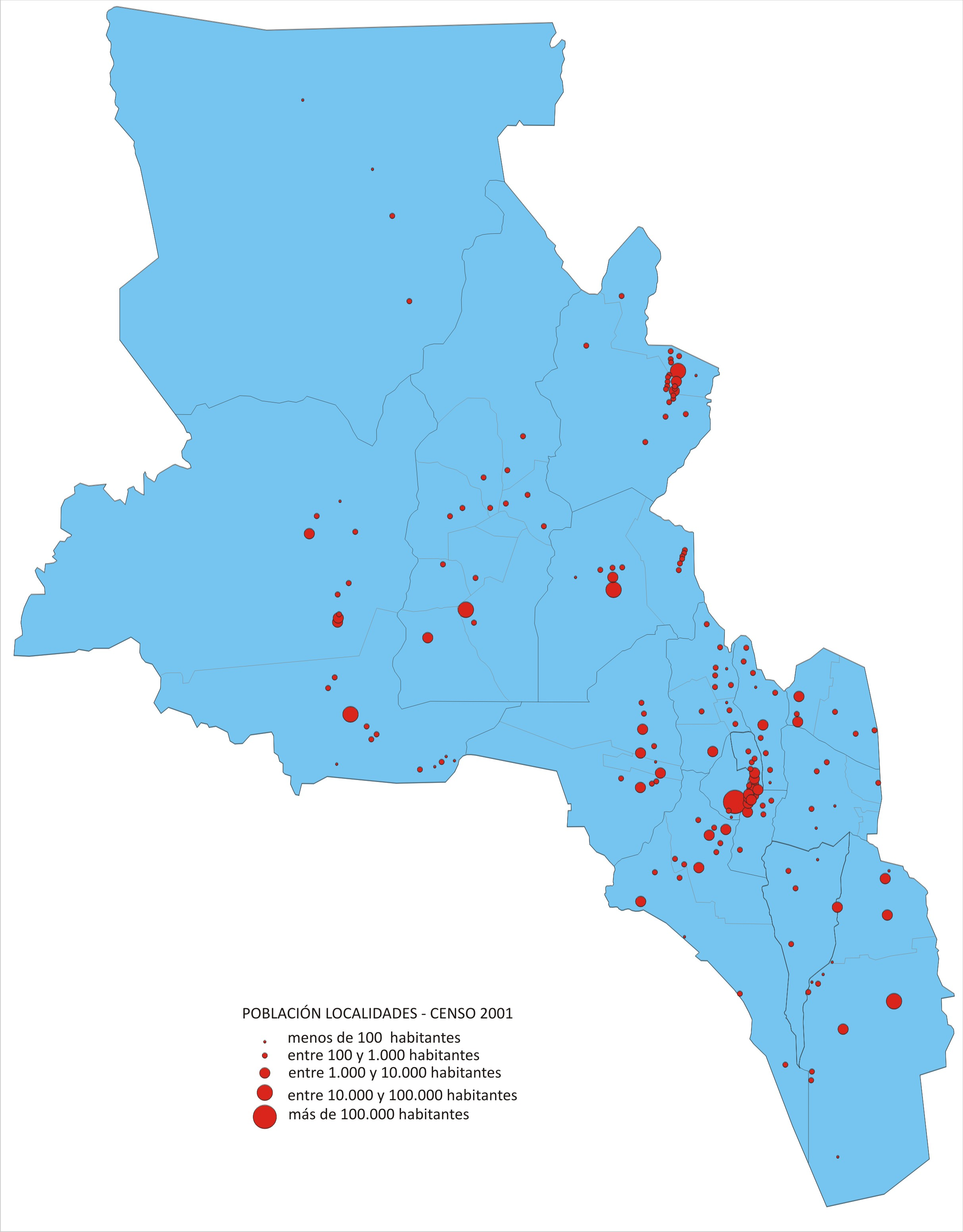 Mapa de Catamarca con localidades según su población. Año 2001